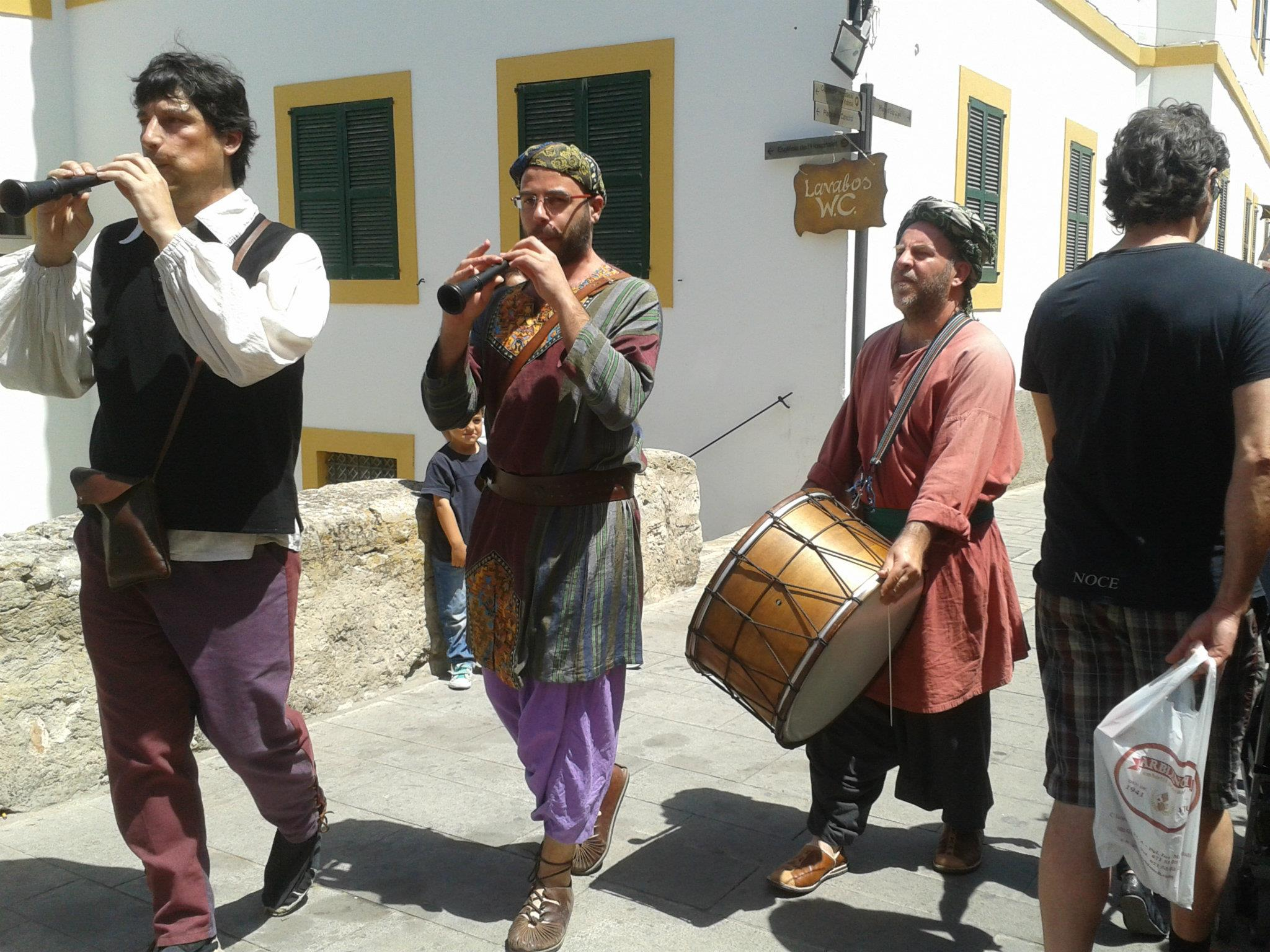 Músics a la Fira Medieval d'Eivissa